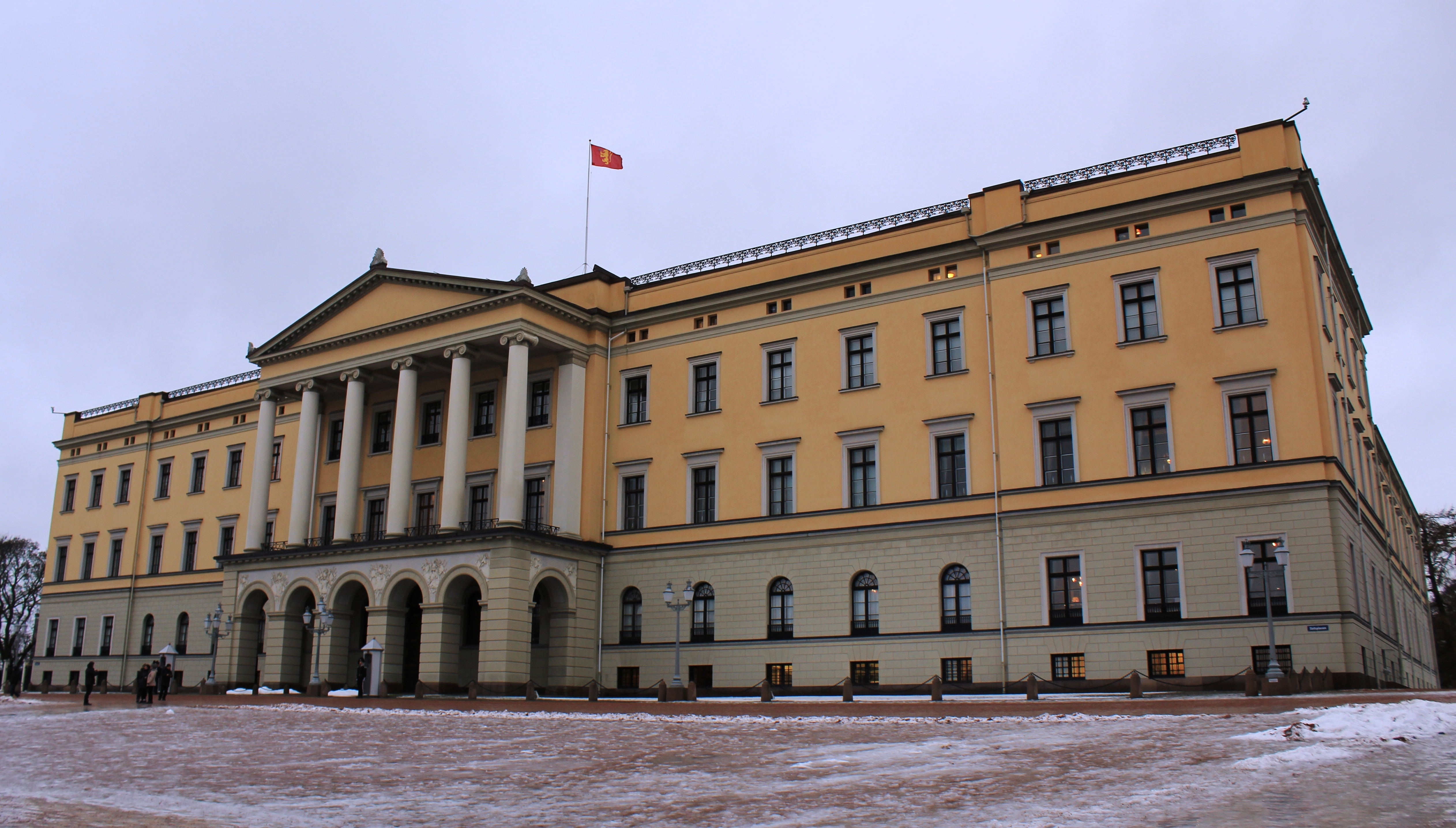 OSLO SLOTT